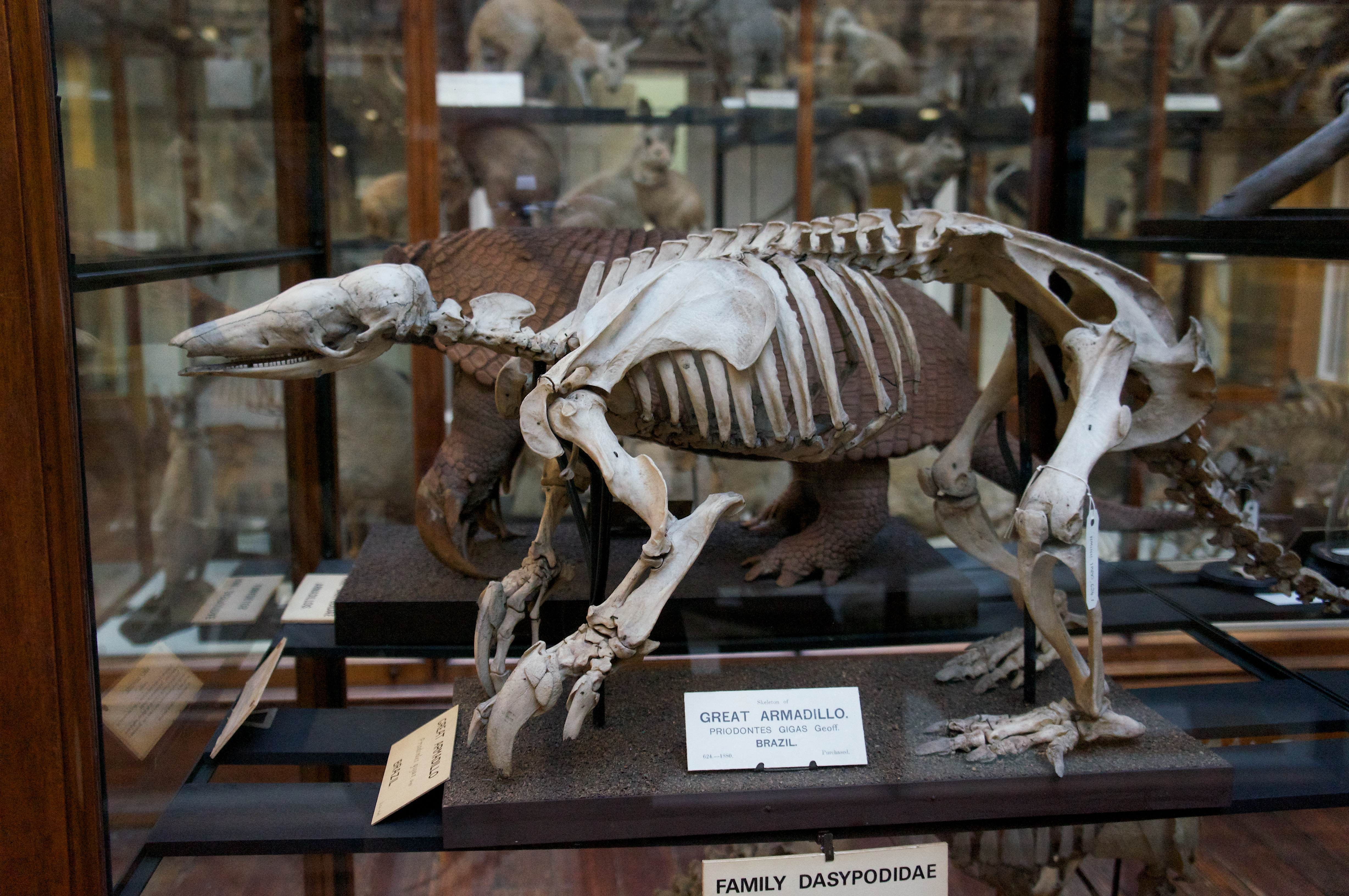 Armadillo